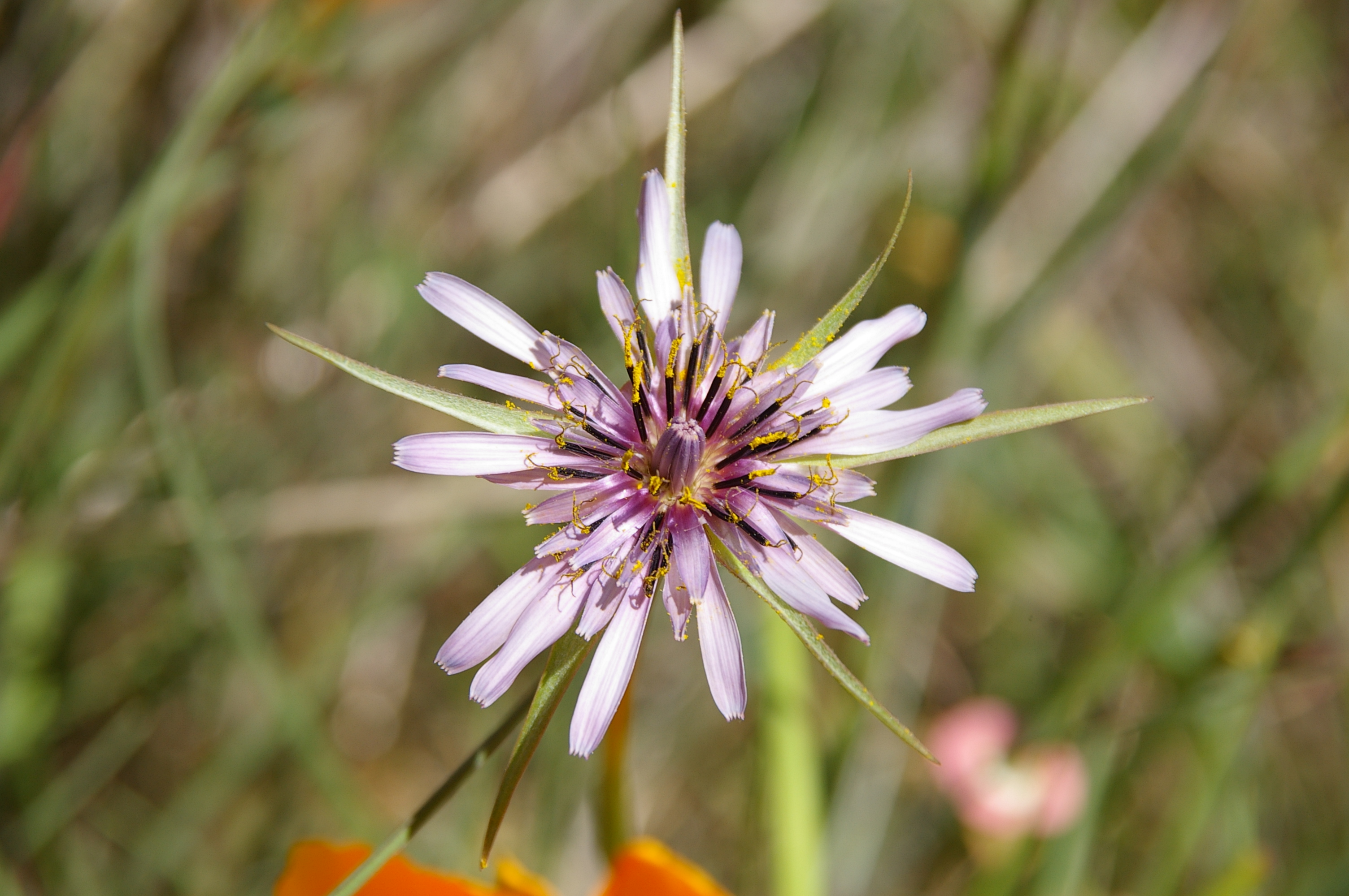 Tragopogon porrifolius